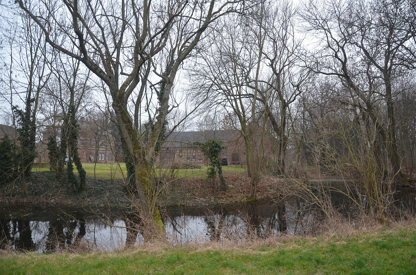 Landschaft im Norden von Röcken